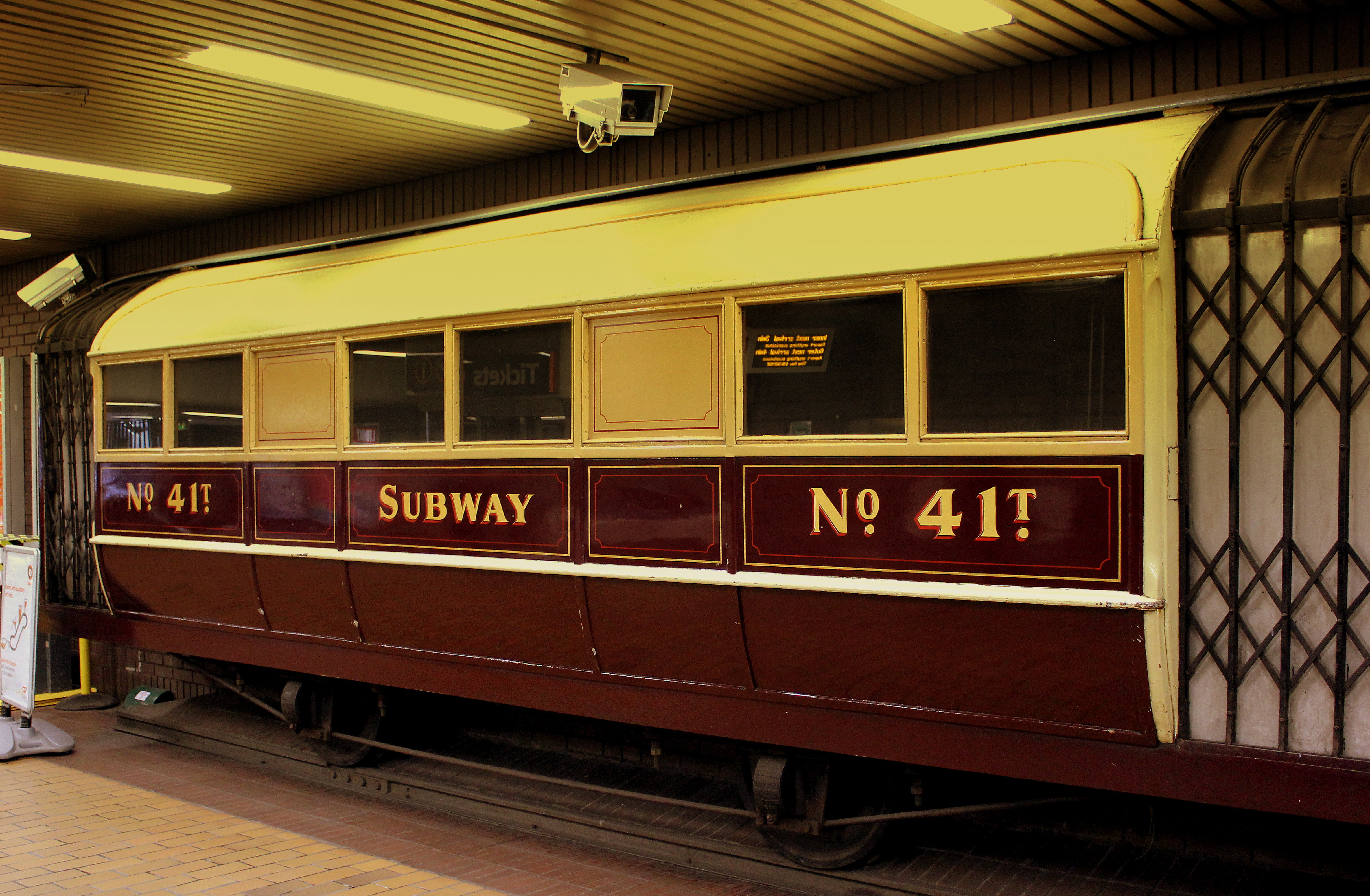 GLASGOW SUBWAY CAR NO41T ON DISPLAY AT BUCHANAN STREET STATION GLASGOW SEP 2013